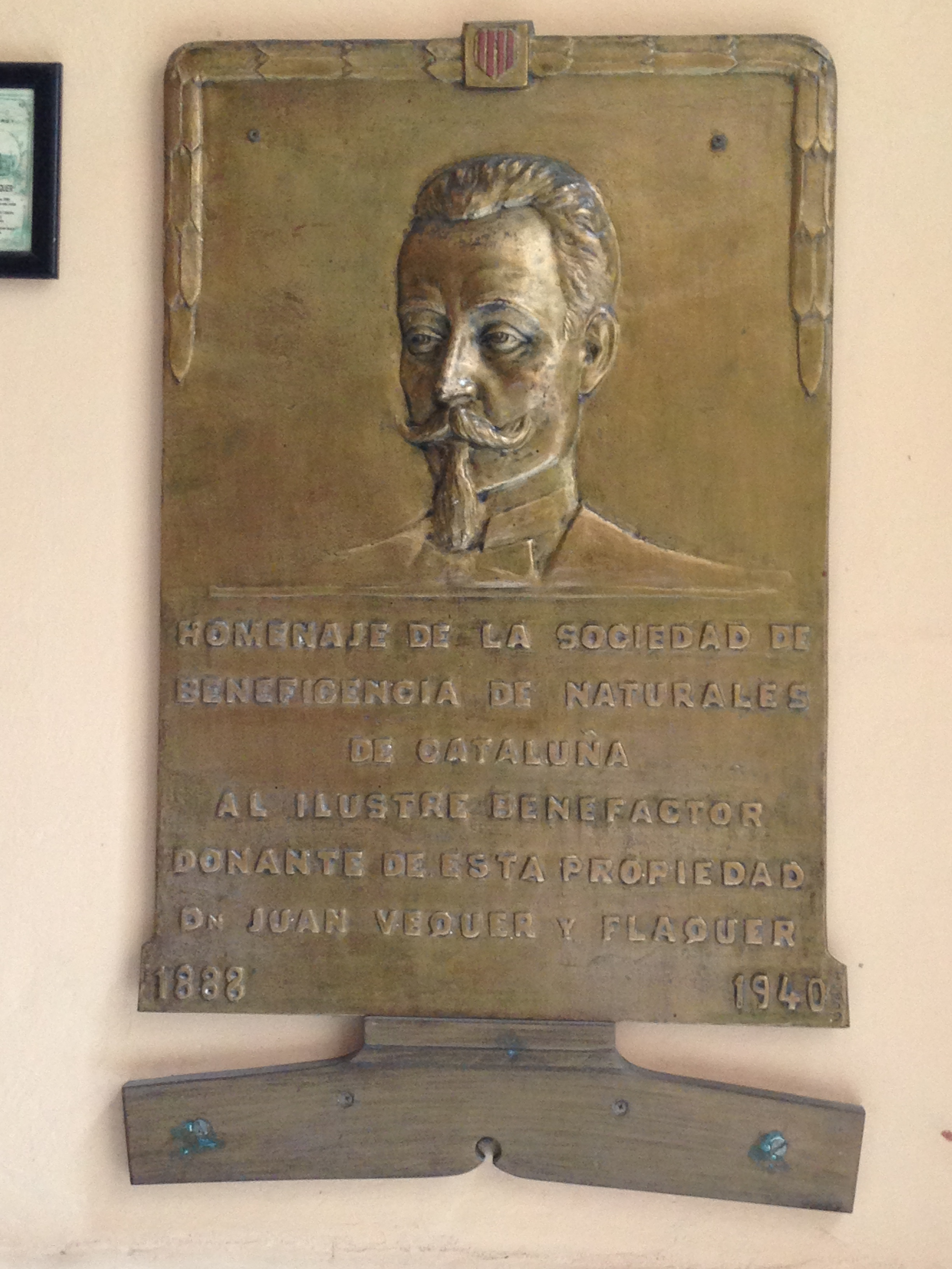 Societat de Beneficència de Naturals de Catalunya, placa homenatge a Joan Veguer i Flaquer